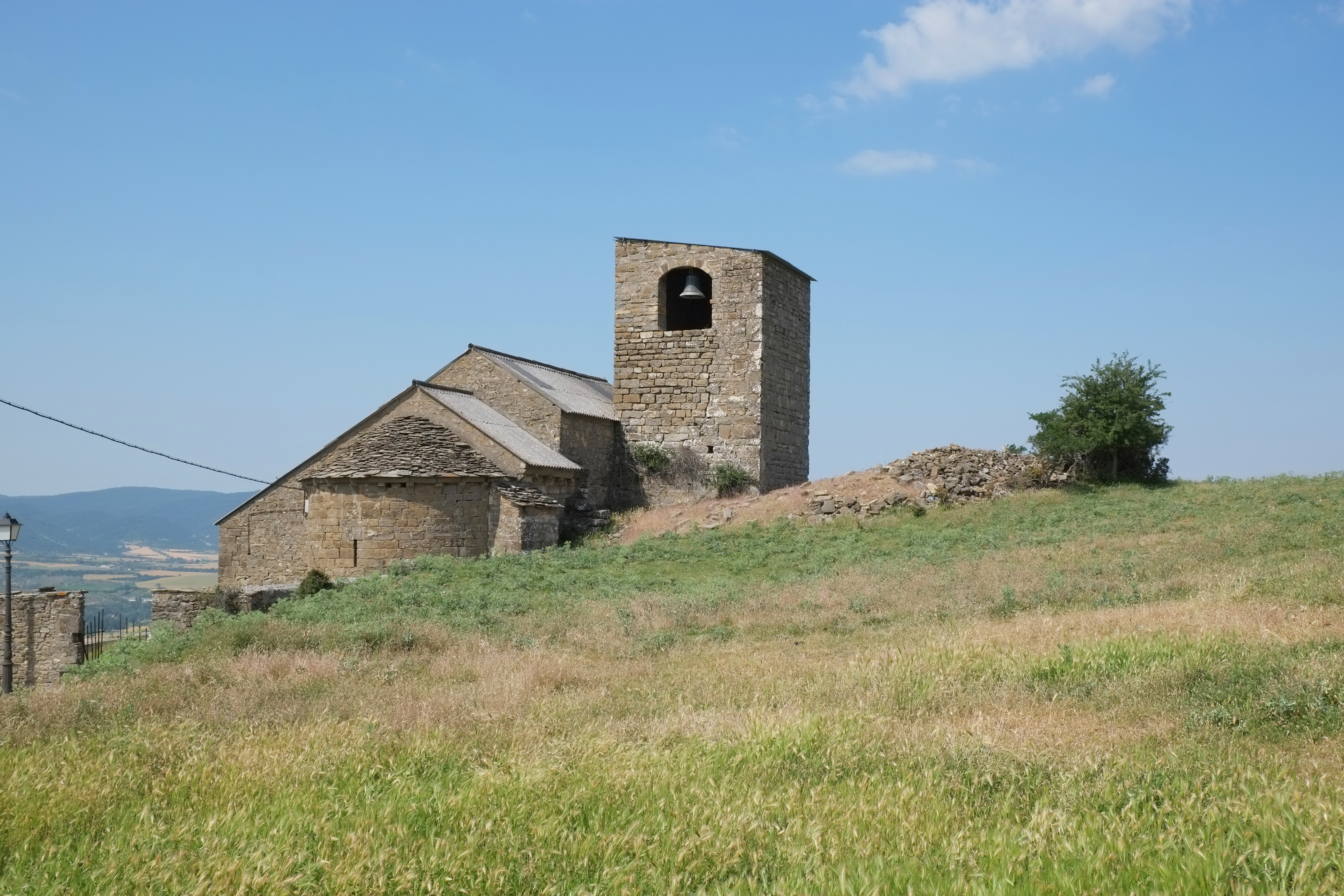 Pfarrkirche San Esteban in Ipás in der Provinz Huesca in Aragonien (Spanien)